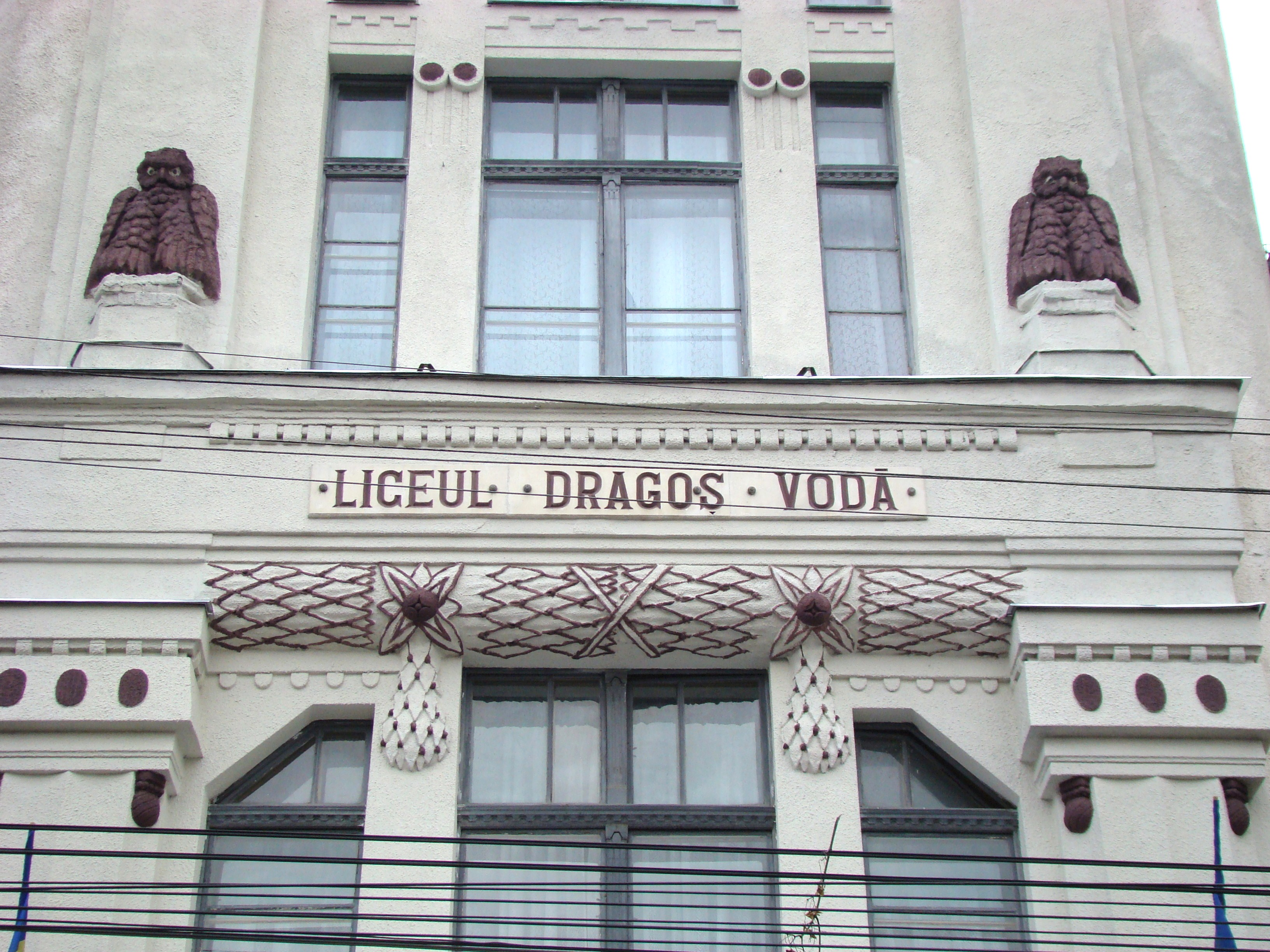 Liceul "Dragoș Vodă", municipiul Sighetu Marmației, Str. Mihai Viteazul 14